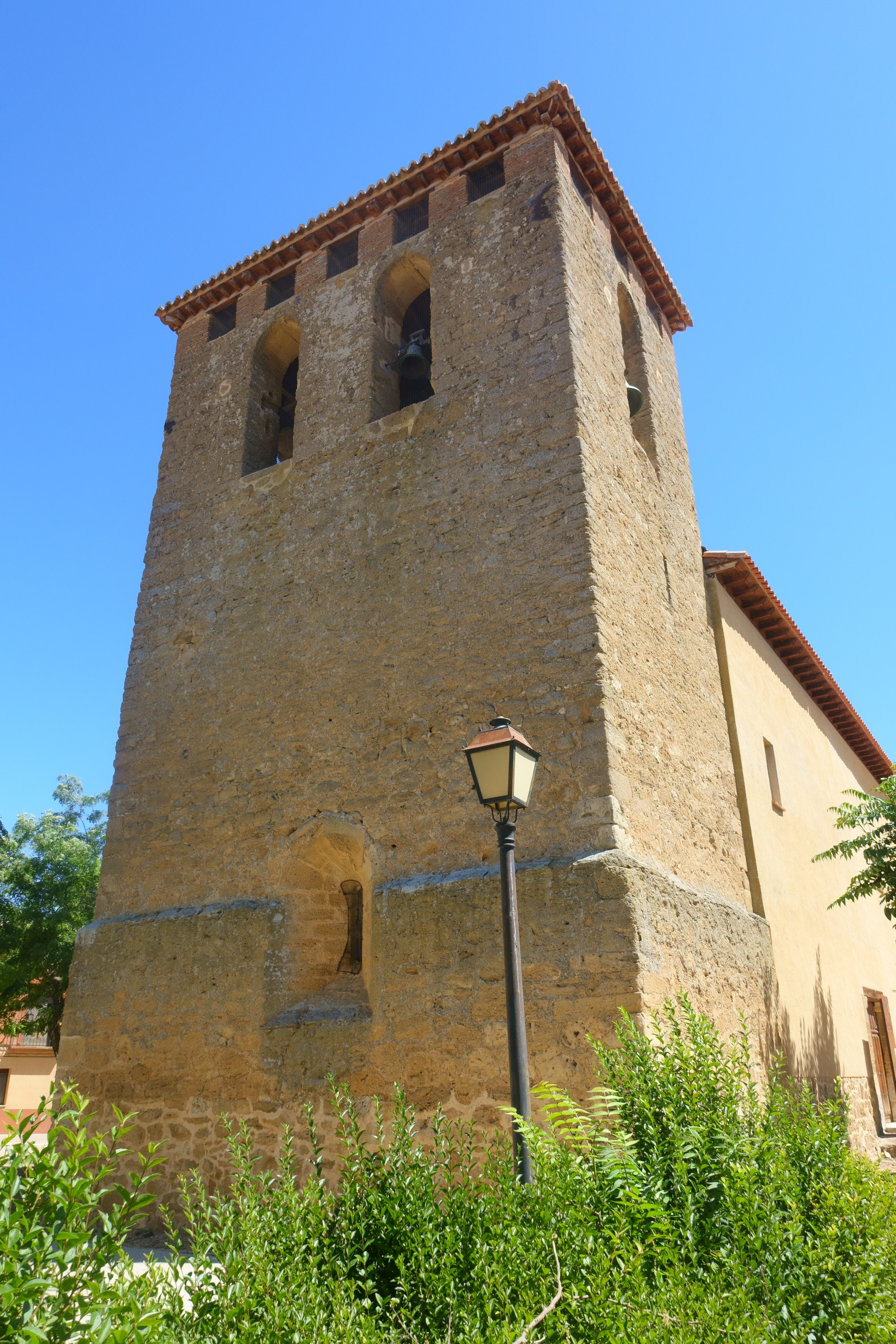 Iglesia de San Esteban Protomártir, en Villamayor de Campos (Zamora, España).